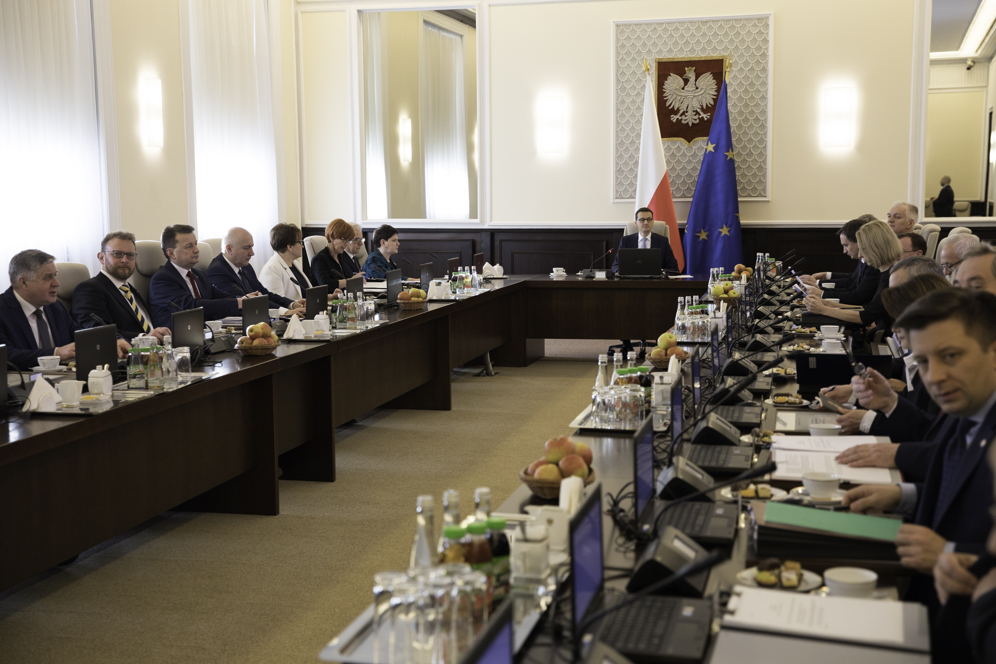 "Jest dla nas sprawą najwyższej wagi, żebyśmy budowali Polskę silną i bezpieczną. Bezpieczną na granicach zewnętrznych, bezpieczną wewnątrz naszego kraju, bezpieczną finansowo" – powiedział premier Mateusz Morawiecki, prezentując skład swojego gabinetu.